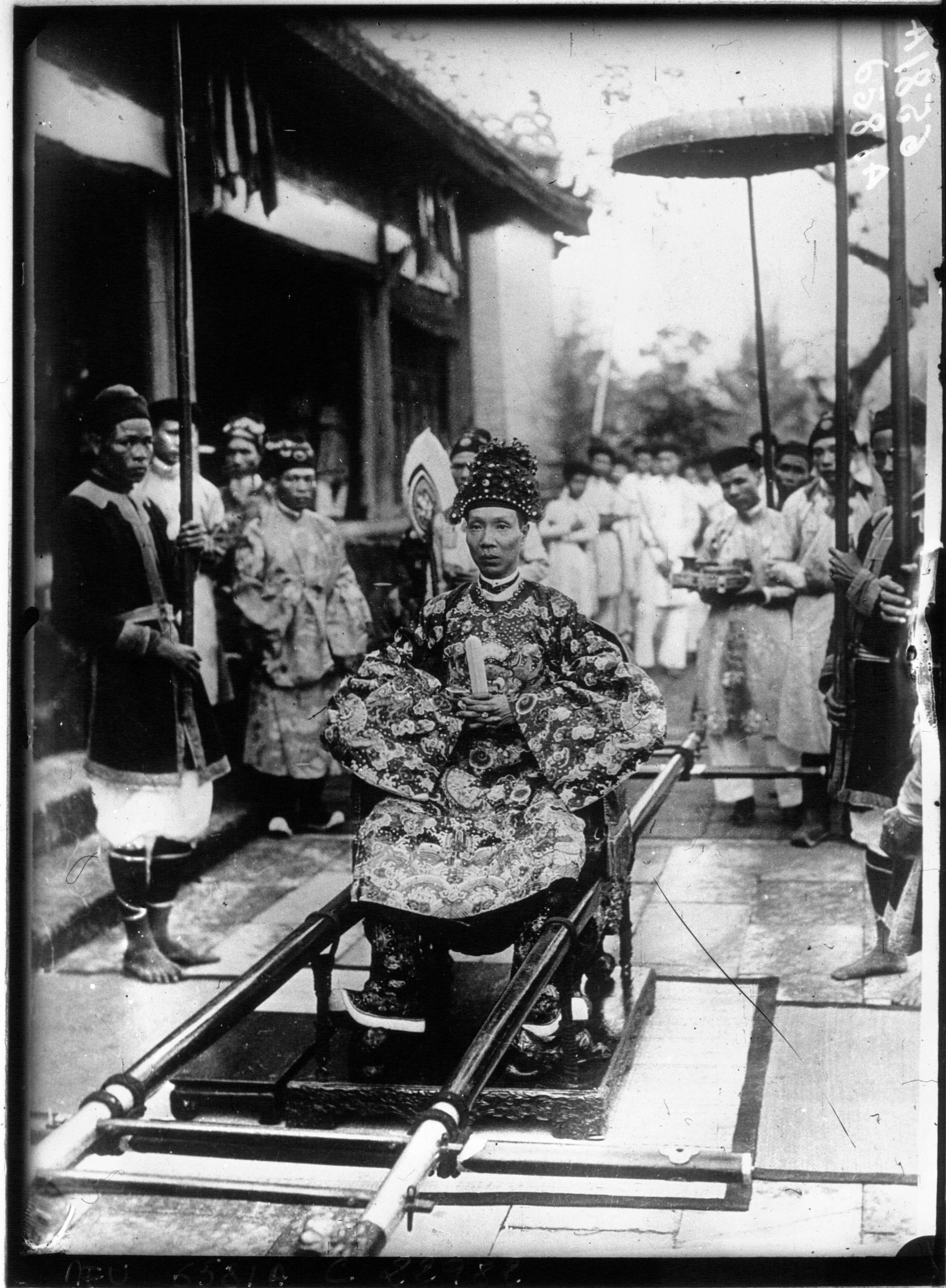 L'empereur Khai Dinh à Hué